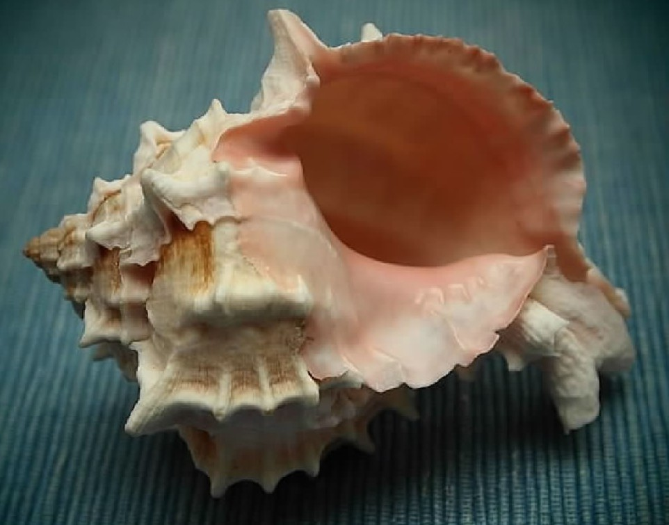 Hexaplex erythrostomus Location: Philippines